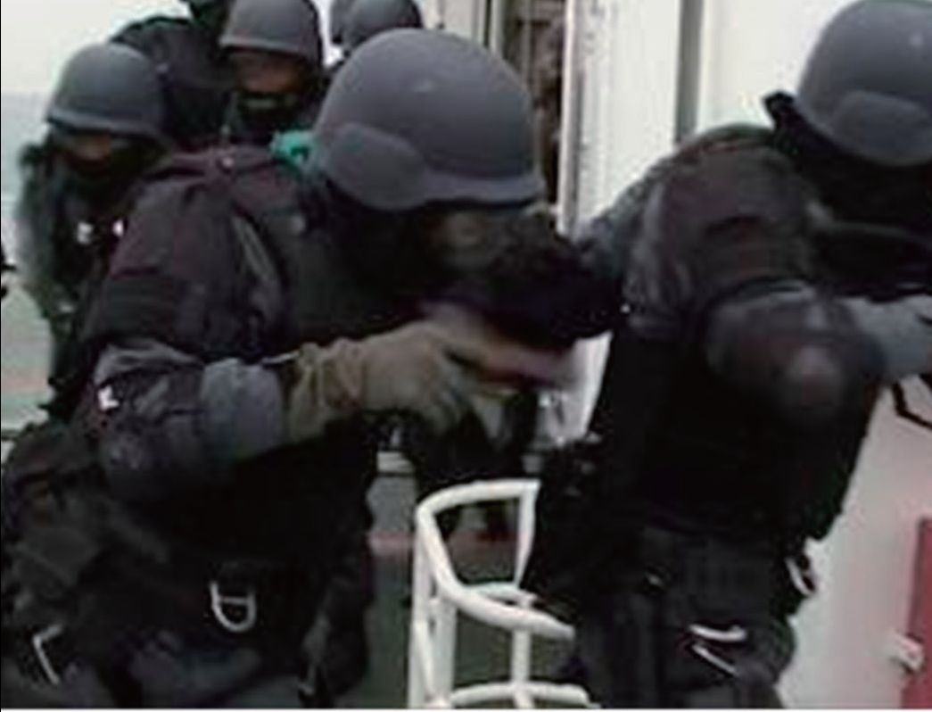 平成８年５月 大阪特殊警備基地の設置、特殊警備隊の発足 第五管区海上保安本部に大阪特殊警備基地を設置し、特殊警備隊を発足させた。